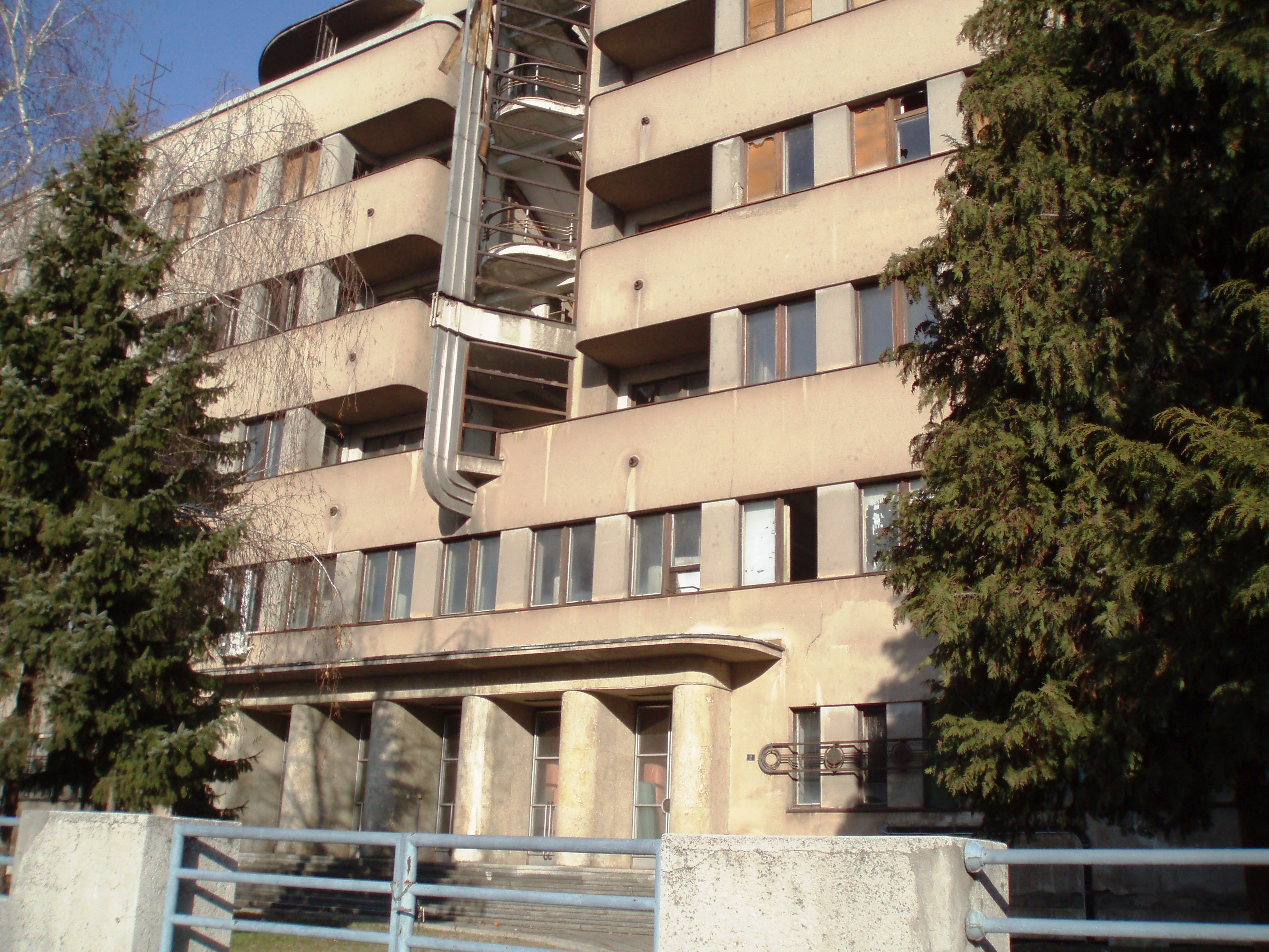 Glavni ulaz u zgradu Komande vazduhoplovstva u Zemunu, autor fotografije: Nicolo